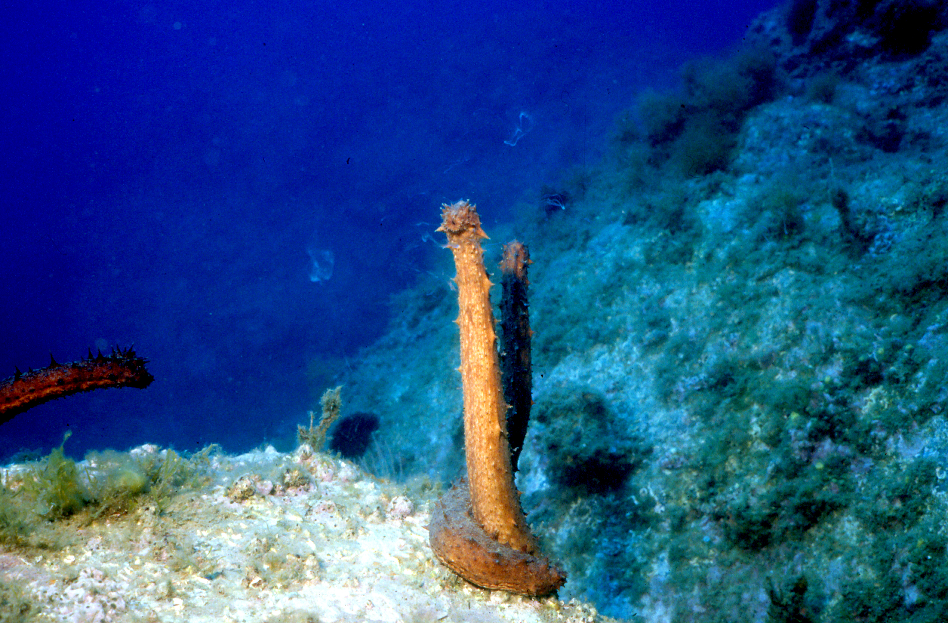 Holothuria tubulosa Gmelin, 1790 - Banyuls-sur-Mer : 07/99, reproduction